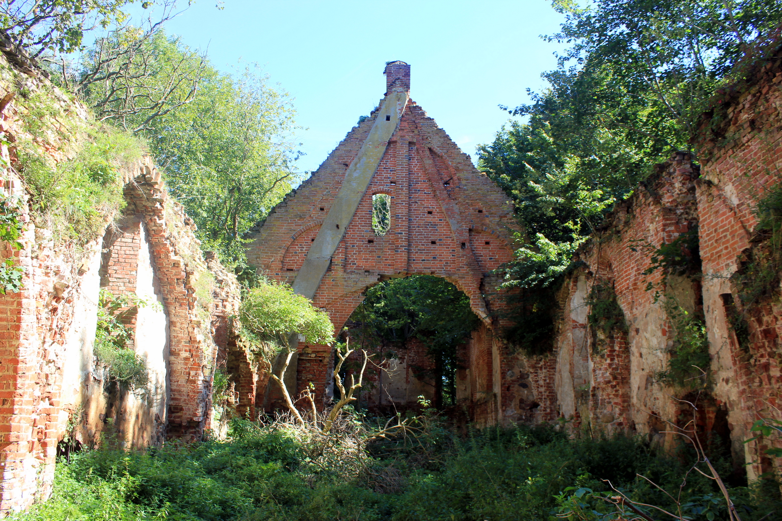 Ruine der Dorfkirche in Schaaken (heute Schemtschuschnoje, Oblast Kaliningrad).